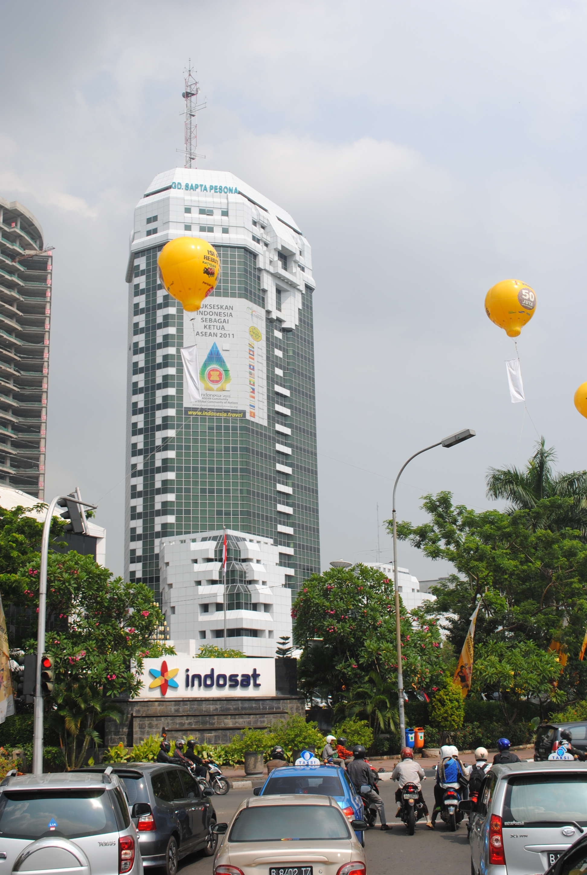 Gedung Sapta Pesona